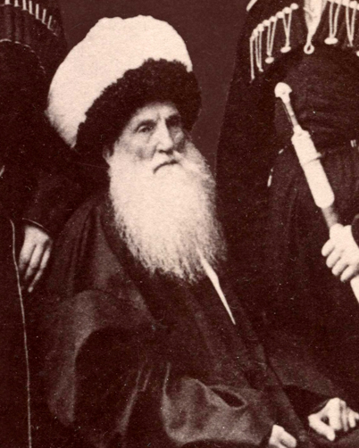 Имам Шамиль